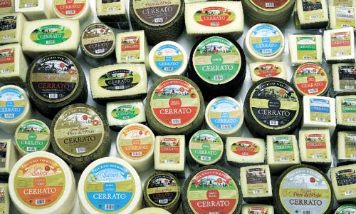 Queso del Cerrato.